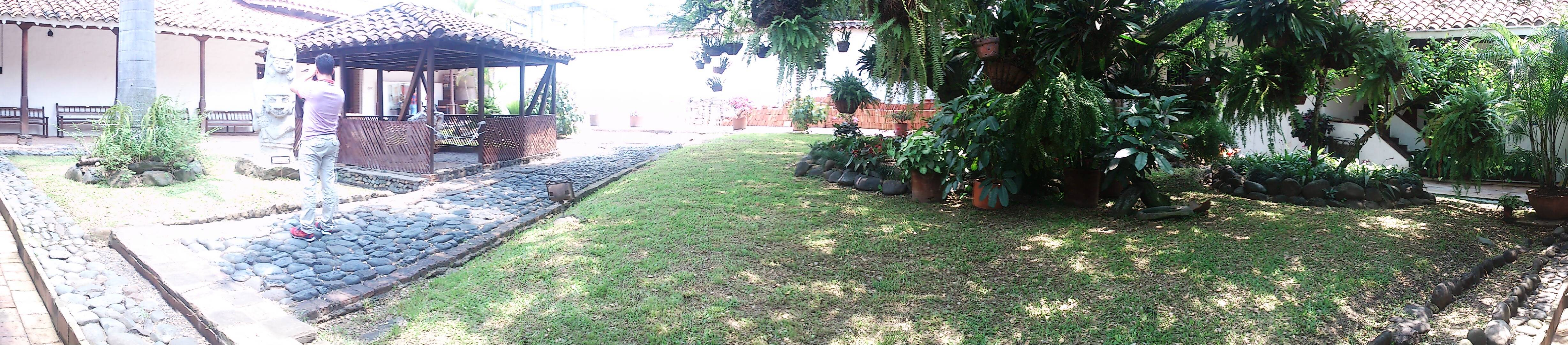 Interior y exposiciones del Museo arqueológico La Merced Cali